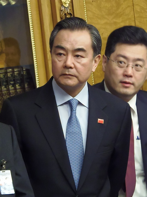 左起：中华人民共和国外交部部长王毅、中华人民共和国外交部发言人秦刚。（美国之音白桦拍摄）